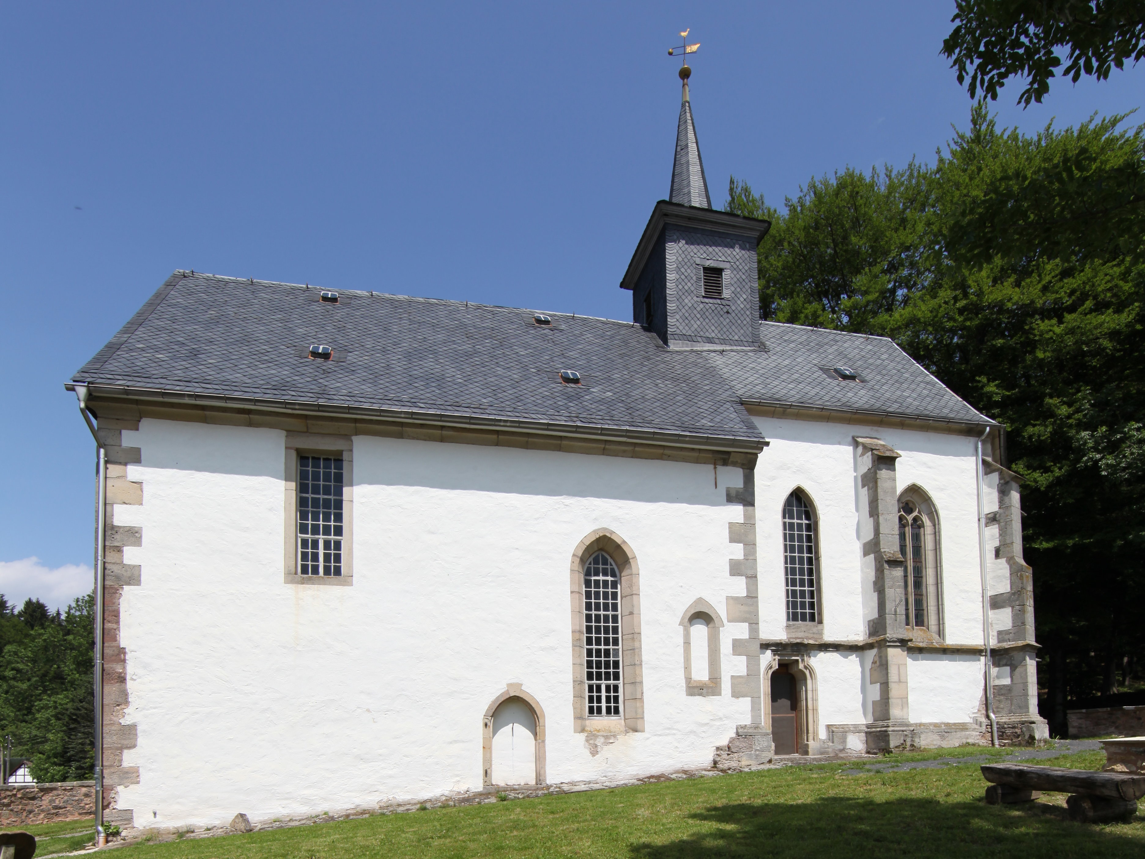 Evangelisch-lutherische Kirche St. Marien in Stelzen, OT von Sachsenbrunn, Thüringen